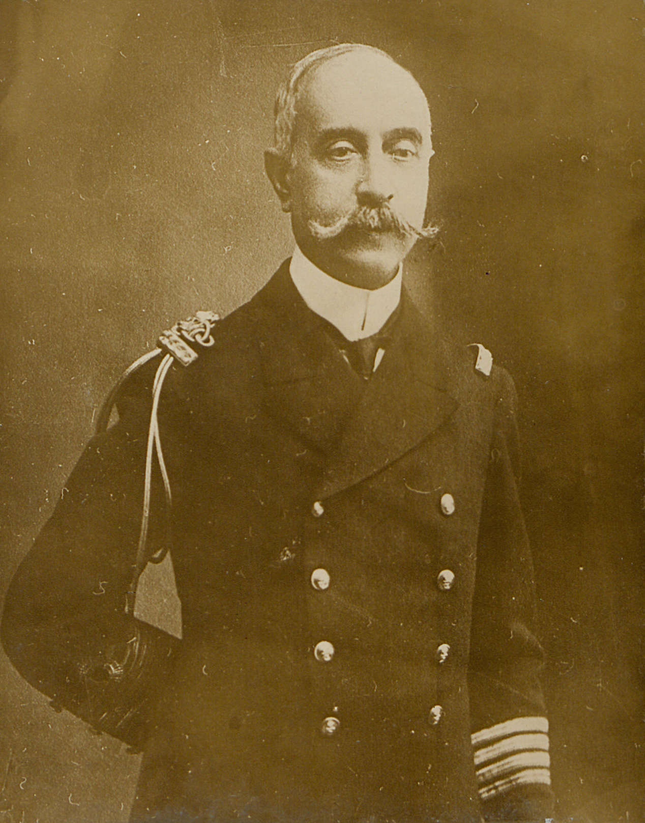 Der griechische Flottenkommandant, Admiral Coundouriotis